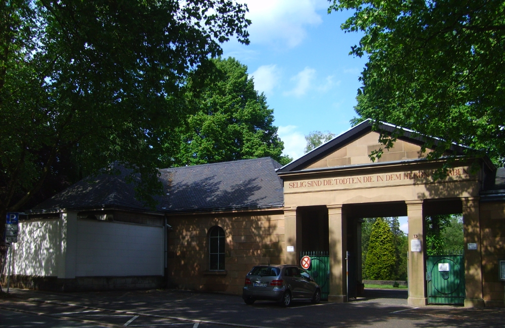 Friedhofskapelle und Haupttor des reformierten Friedhofs an der Hochstraße, Wuppertal-Elberfeld, Germany